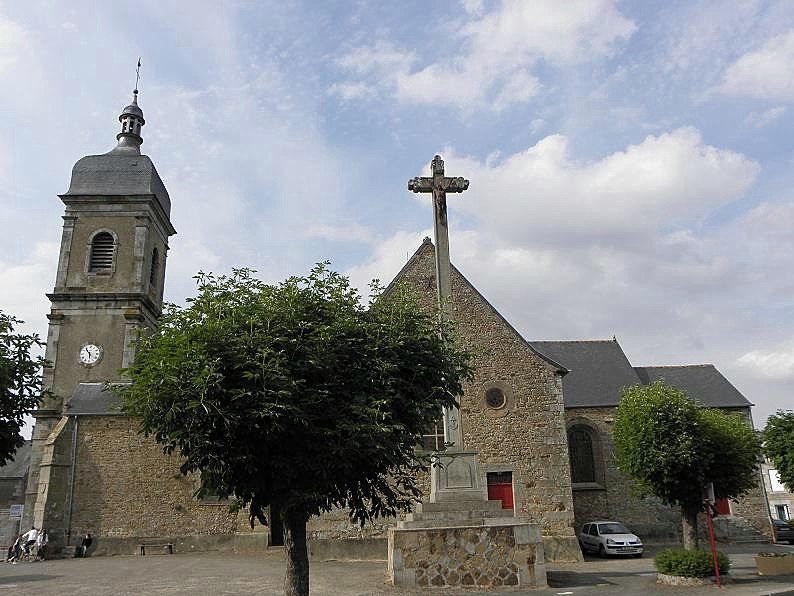 Vue méridionale de l'église Saint-Germain de Vieux-Vy-sur-Couesnon (35).